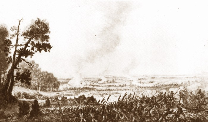 Bitwa pod Maciejowicami part 2